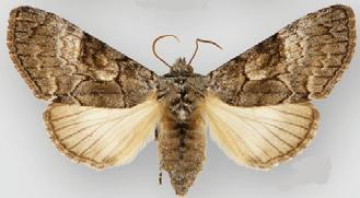 Charadra moneta female